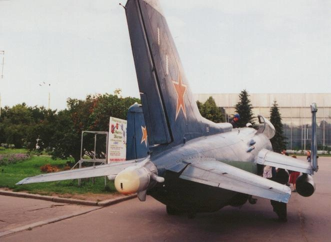 Yakovlev Yak-38 VTOL fighter